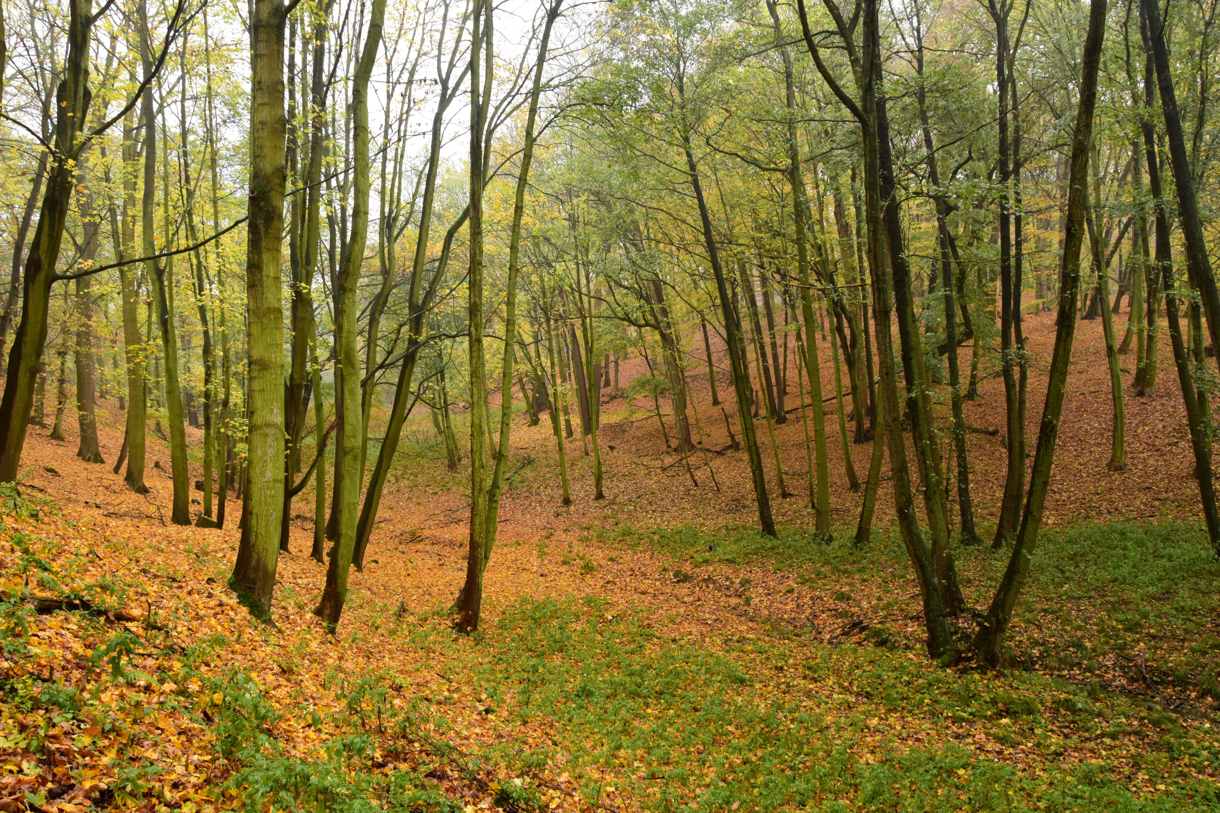 Přírodní památka Červený Hrádek – jihovýchodní část chráněného území v údolíčku bezejmenného potoka